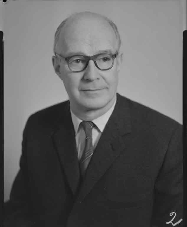 Walo von Greyerz, Schweizer Nationalrat und Journalist, Porträt